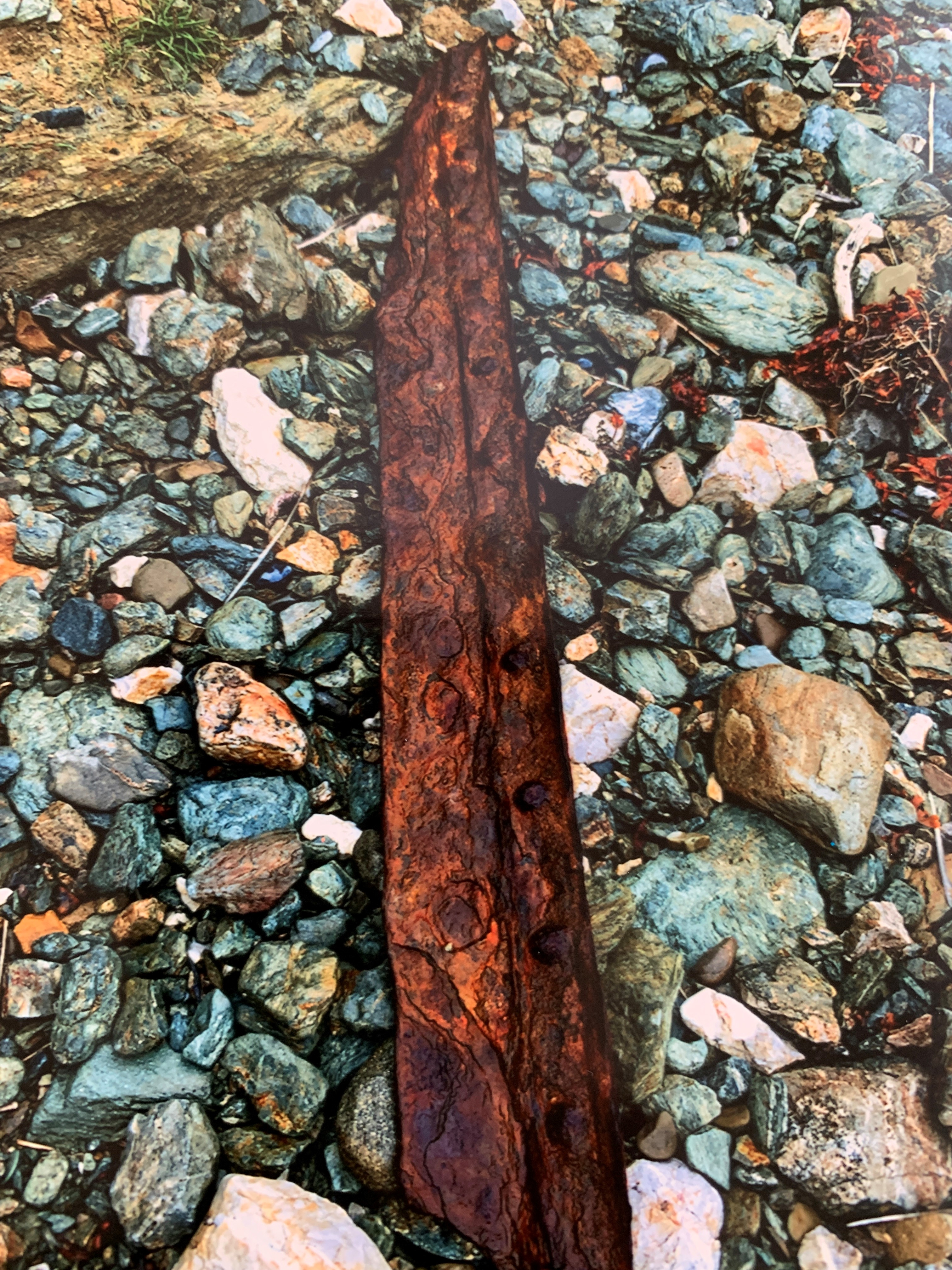 Darn haearn o'r Stewart sydd i'w weld ar drai ym Mhorth Ty Mawr.